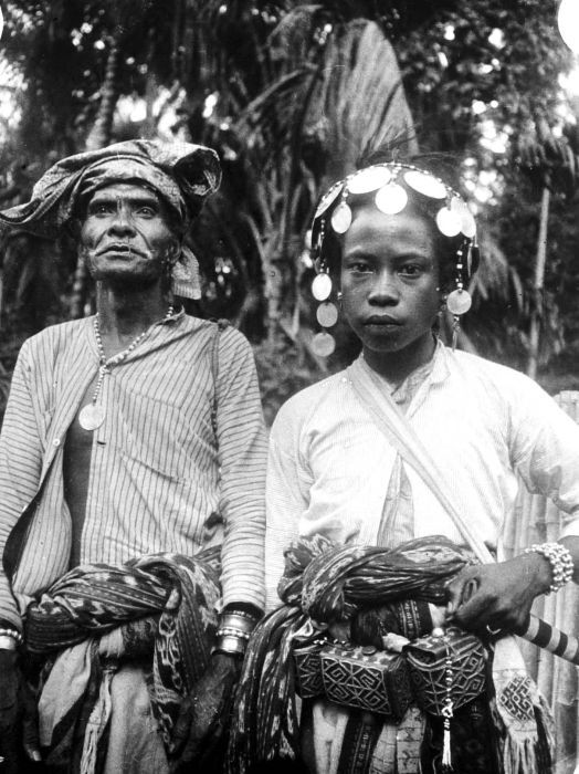 Repronegatief. Een meo, voorvechter en priester, van Mata-Amarasi met zijn vader in vol ornaat